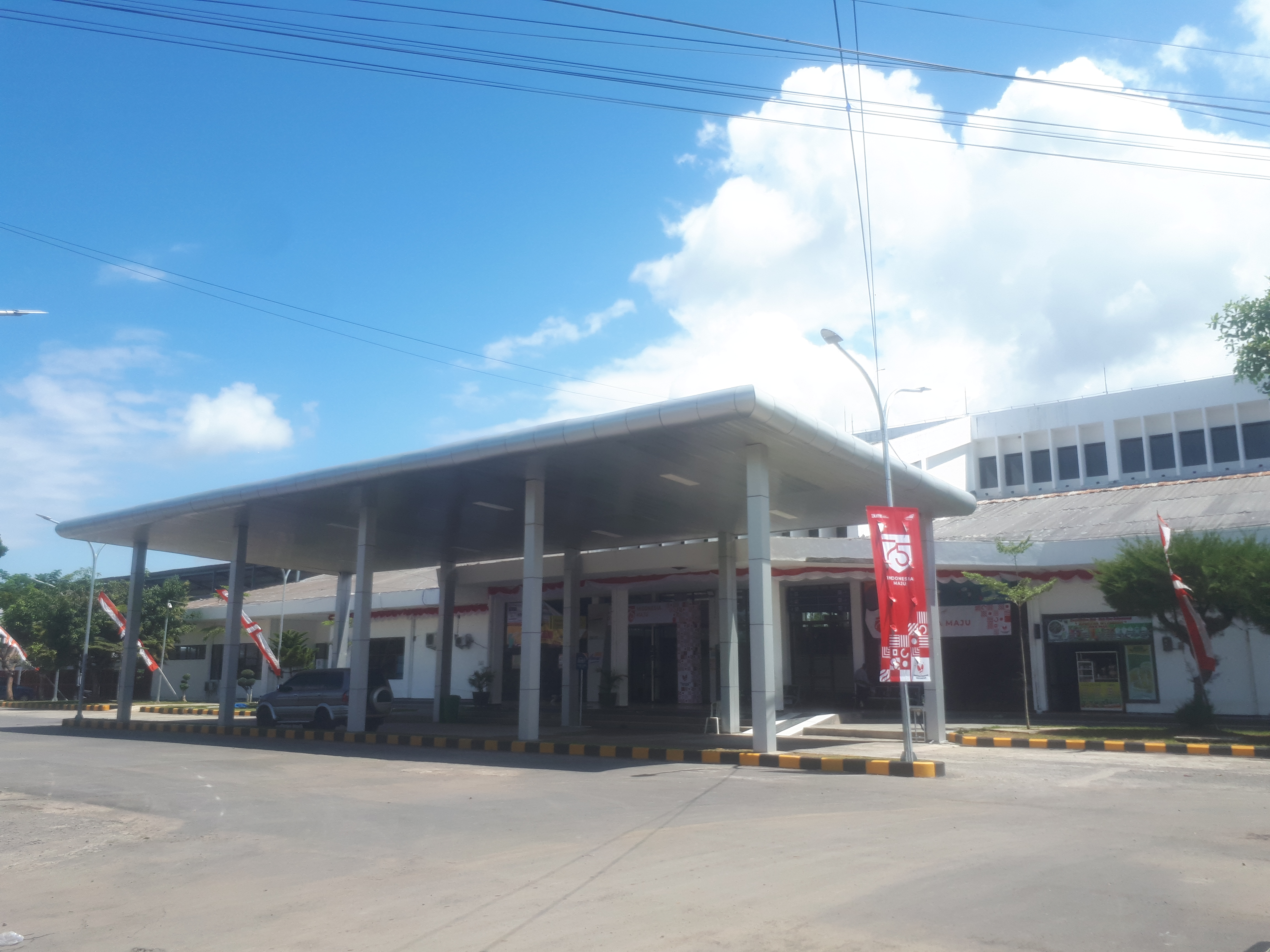 Tampak depan bangunan utama Stasiun Ketapang, Banyuwangi, 2020